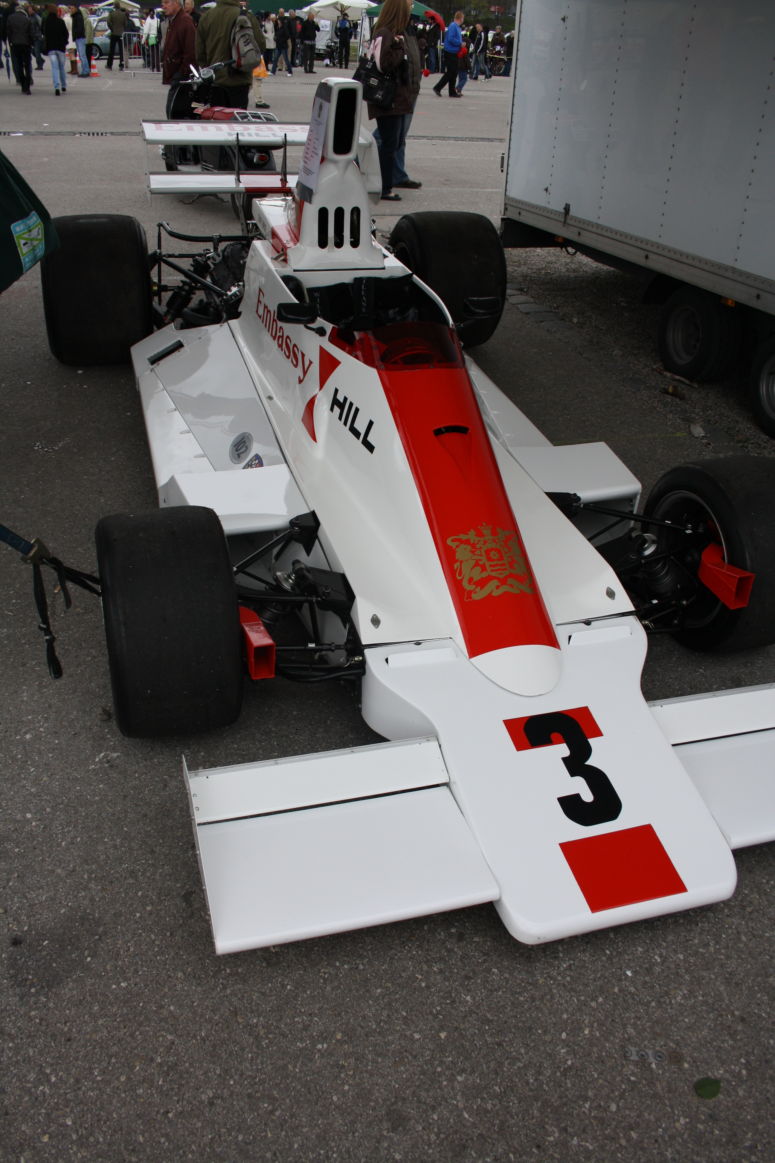 9. ACM-Oldtimertreffen “Unter der Bavaria”. Odtimertreffen auf der Theresienwiese in München. Veranstalter Automobil-Club München (ACM). Rennwagen Marke Embassy Hill, Typ GH2 Formel 1